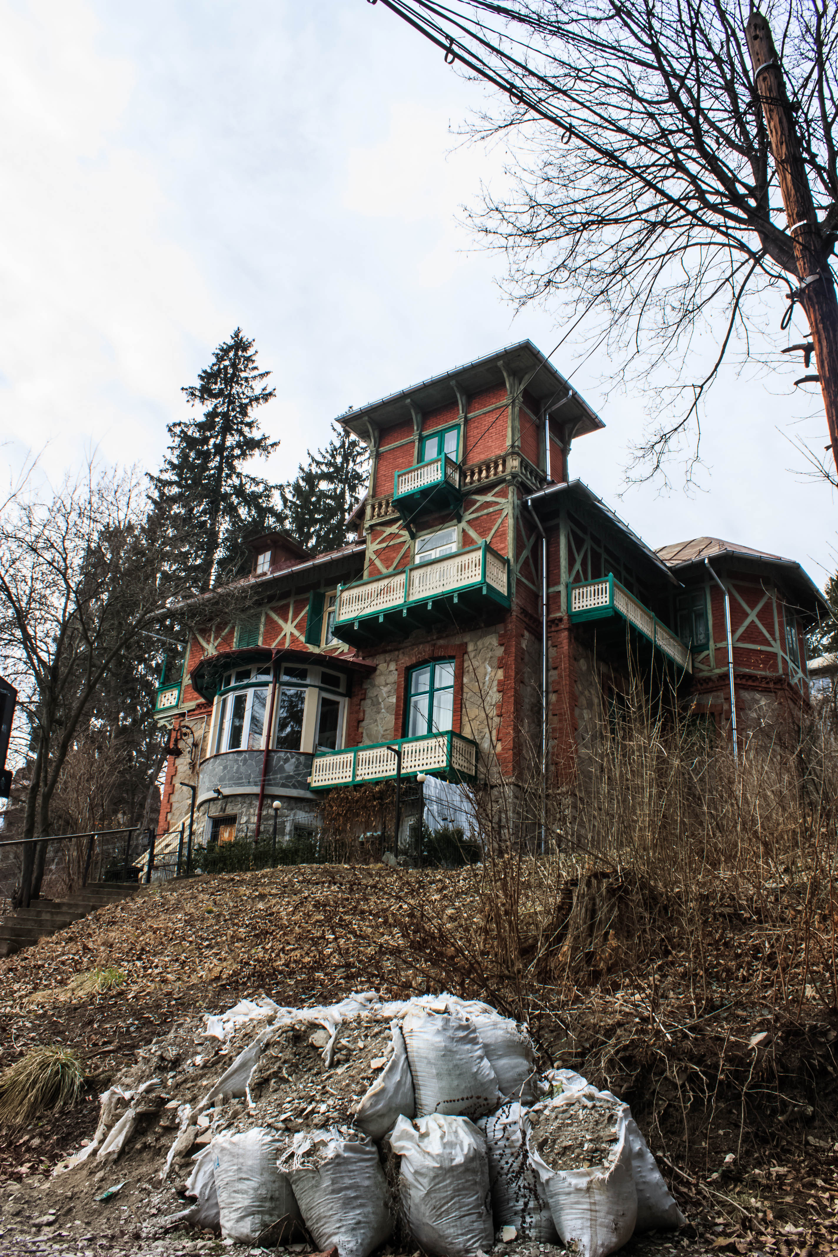 Casa Filittis